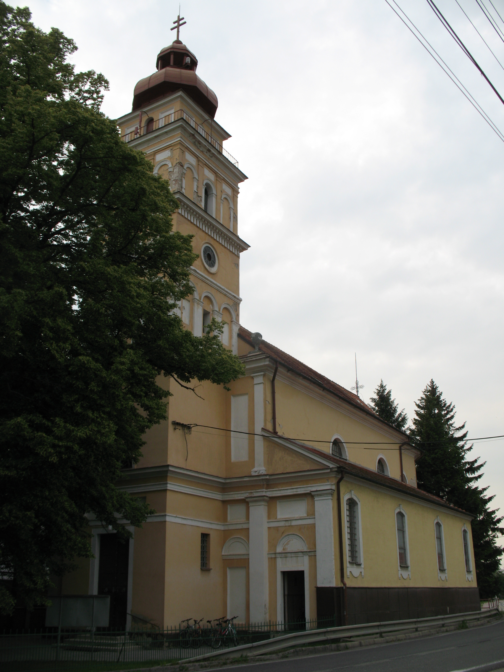 Vágmosóc